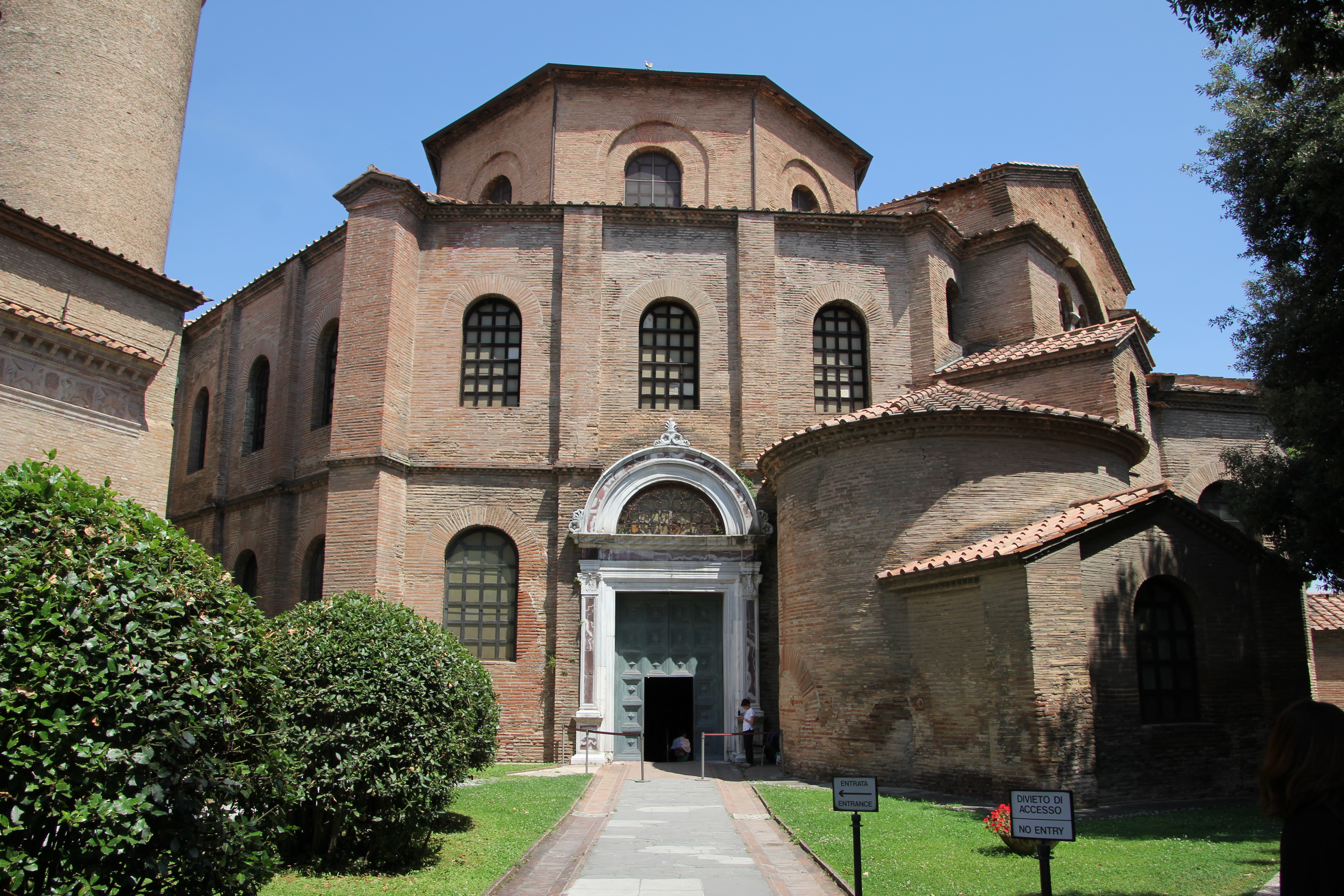 Ravenna, basilica di San Vitale